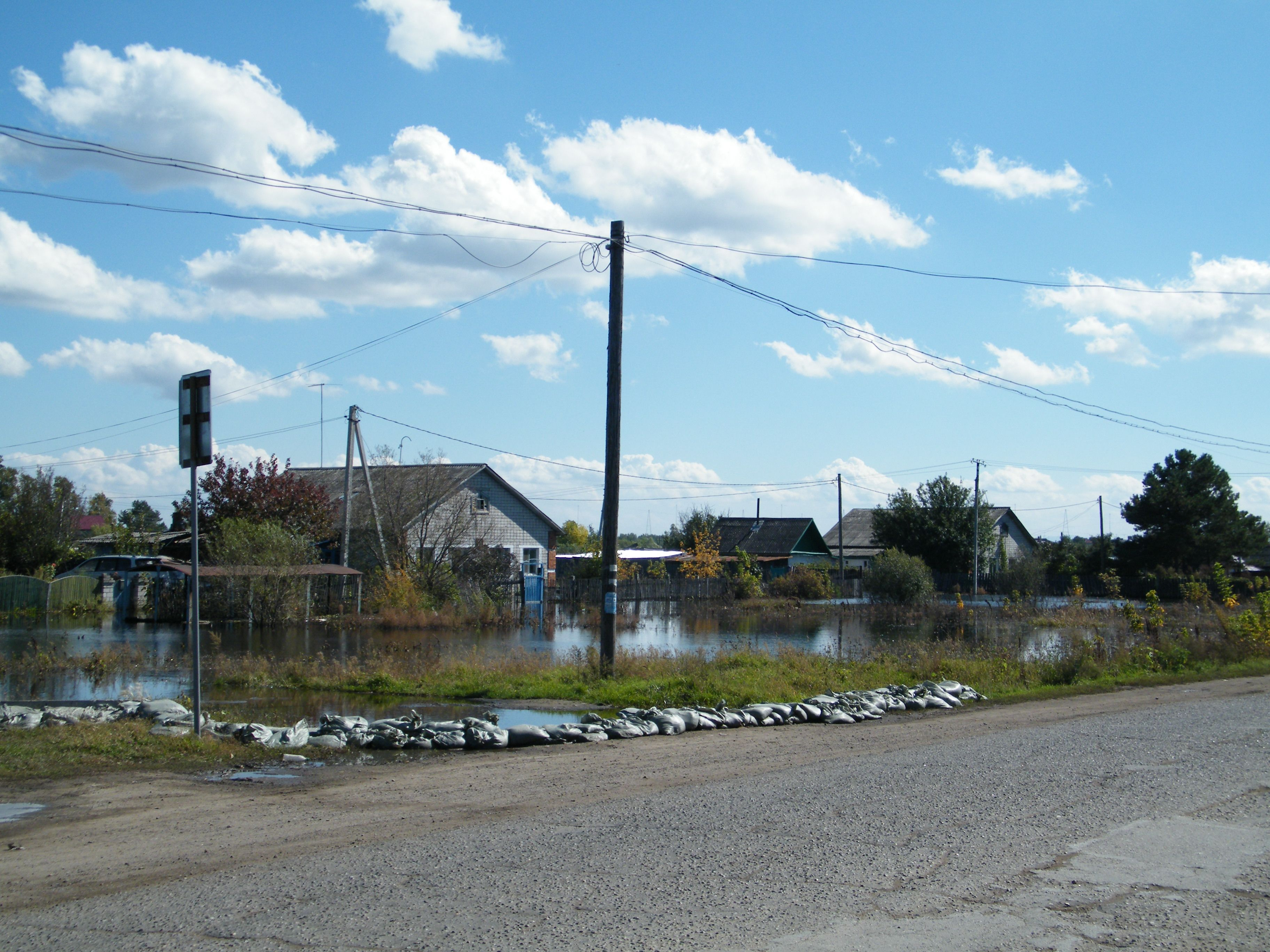 Tunguska EAO River